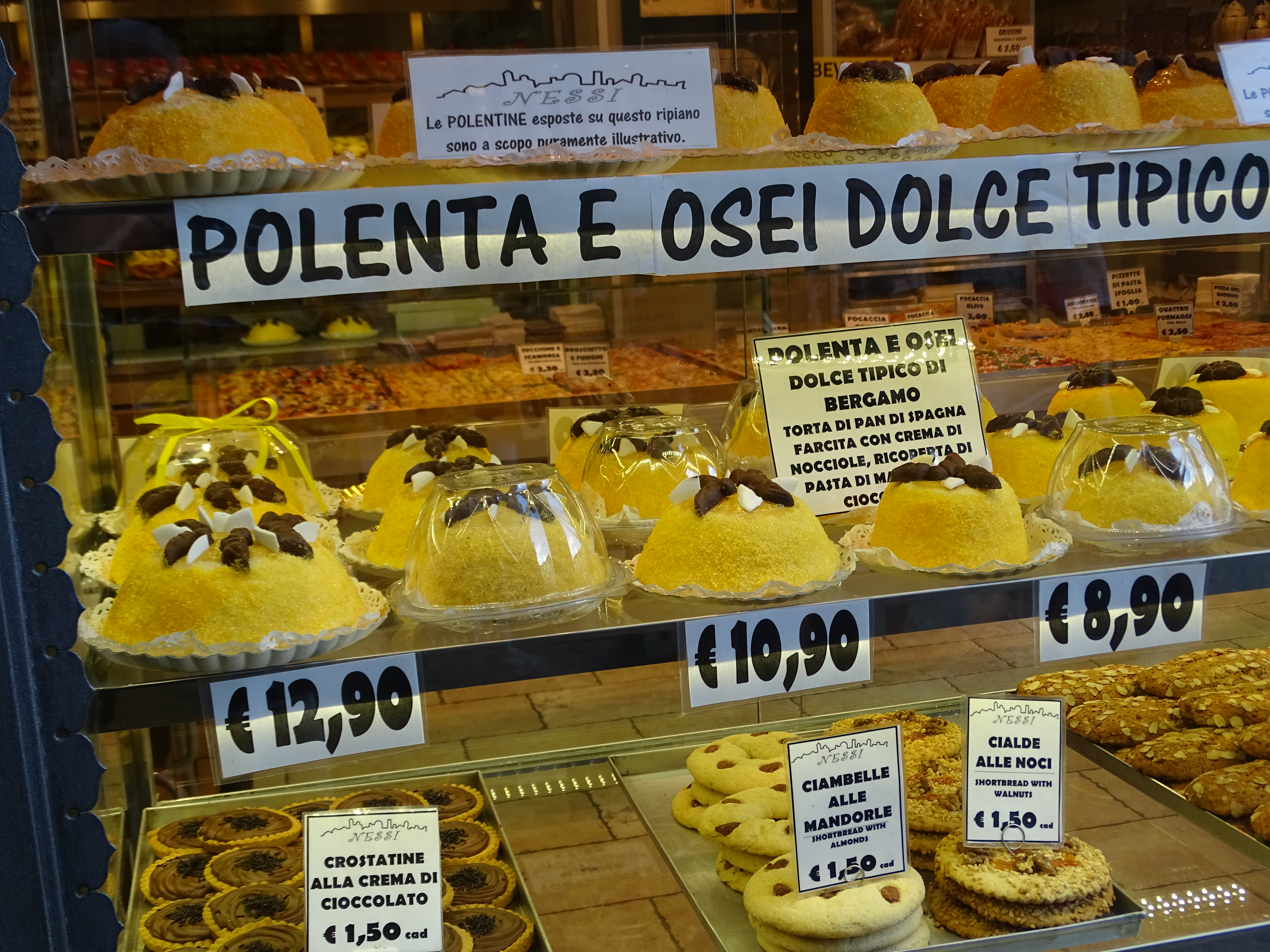 Polenta e osei, die "süße" Variante